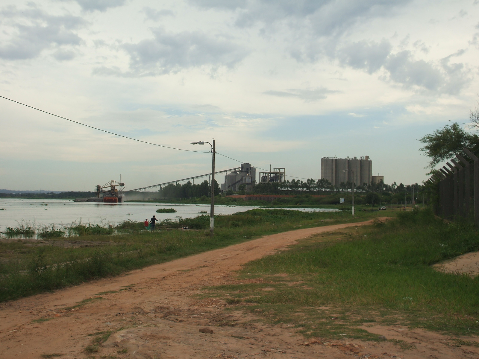 Lugar conocido como Itaty, al fondo el Complejo Industrial y Portuario de la INC